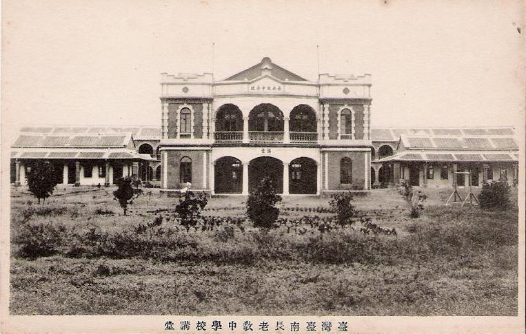 臺灣臺南長老教中學講堂